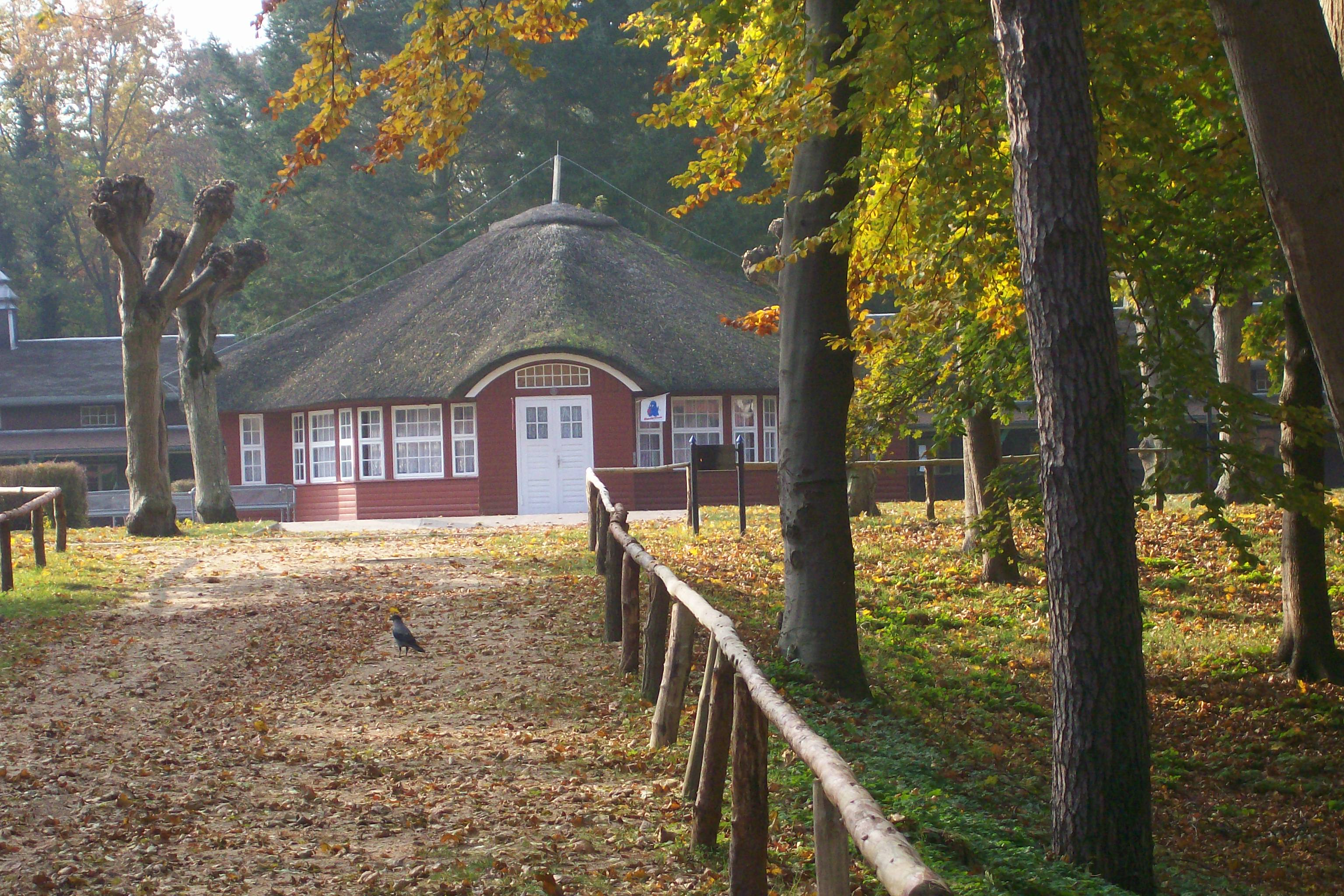 Pavillon des ehemaligen Kaiser-Wilhelm-Kinderheims in Ahlbeck, jetzt Jugendferienpark Ahlbeck der Sportjugend Berlin